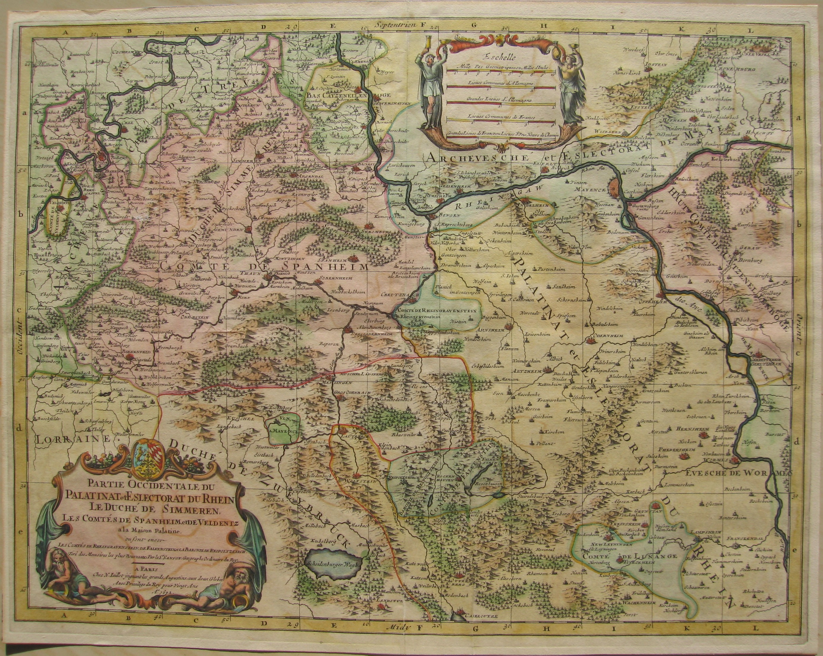 Partie Occidentale du Palatinat et Eslectorat du Rhein Le Duché de Simmeren, Les Comtés de Spanheim, et de Veldentz a la Maison Palatine. ou sont encor Les Comtés de Rheingravenstein, de Falkenstein, et la Baronie de Reipoltzkirch (...) Scale: ca. 1:250.000 Picture Size: 52 x 40 cm Total Size: 56 x 44,5 cm